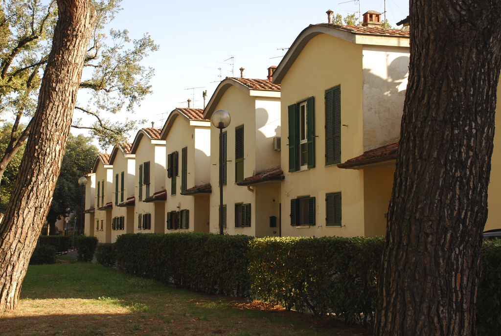 Isolotto (quarter), Florence, Italy. Viale dei Pini: Buildings.